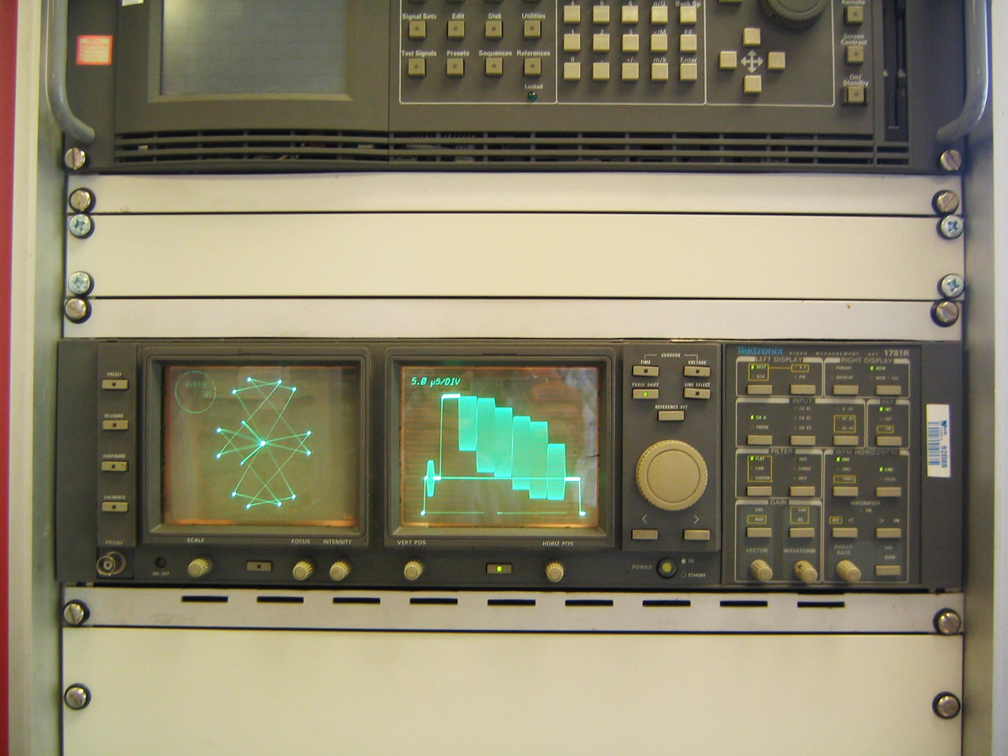 Aparato combinado de MFO y vectoscopio.